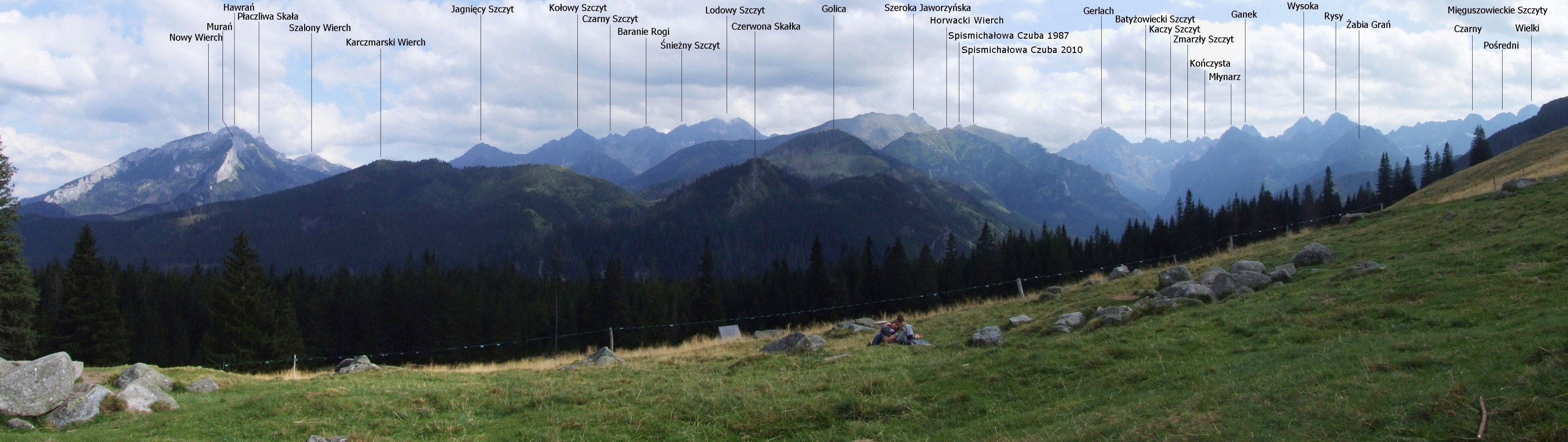 Panorama z Rusinowej Polany